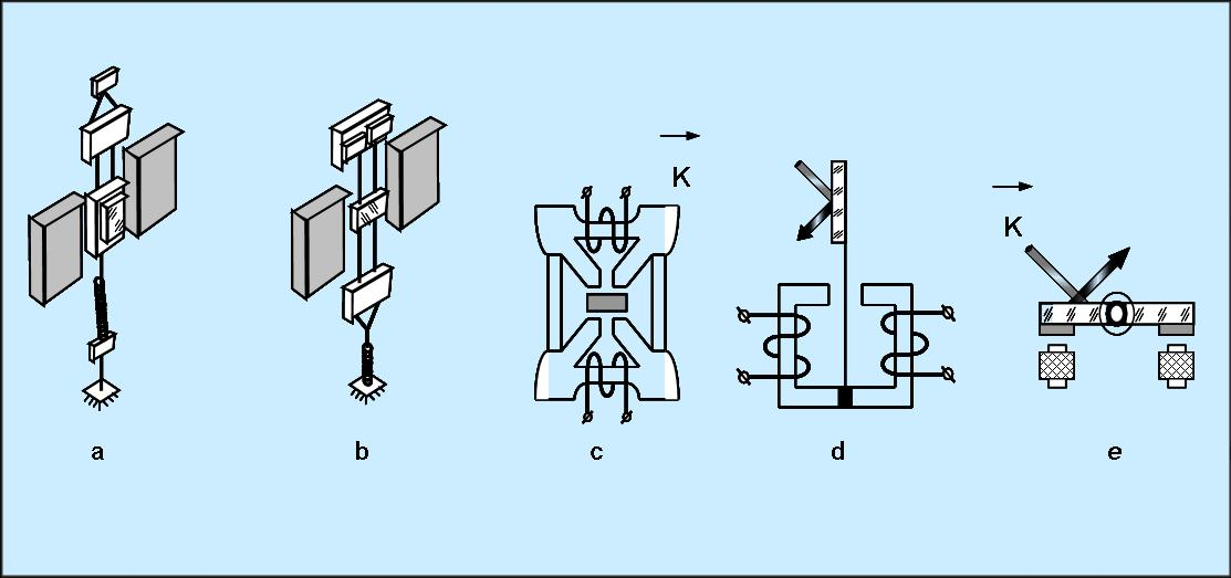 У магнітоелектричних (МЕ) дефлекторах (рис. 7.33,а,b) кутове відхилення оптичного елемента, а відповідно, і оптичного пучка досягається за рахунок сили взаємодії рухомого провідника зі струмом, встановленого на оптичному елементі, з магнітним полем нерухомого постійного магніту. В електромагнітних (ЕМ) дефлекторах (рис. 7.33,c,d,e) кутове переміщення дзеркального відбивача, а, відповідно, і оптичного скануючого пучка досягається за рахунок сили взаємодії магнітного поля рухомого постійного магніту або ж феромагнітного елемента, що механічно з’єднаний з дзеркальним відбивачем, з магнітним полем нерухомого провідника з електричним струмом.